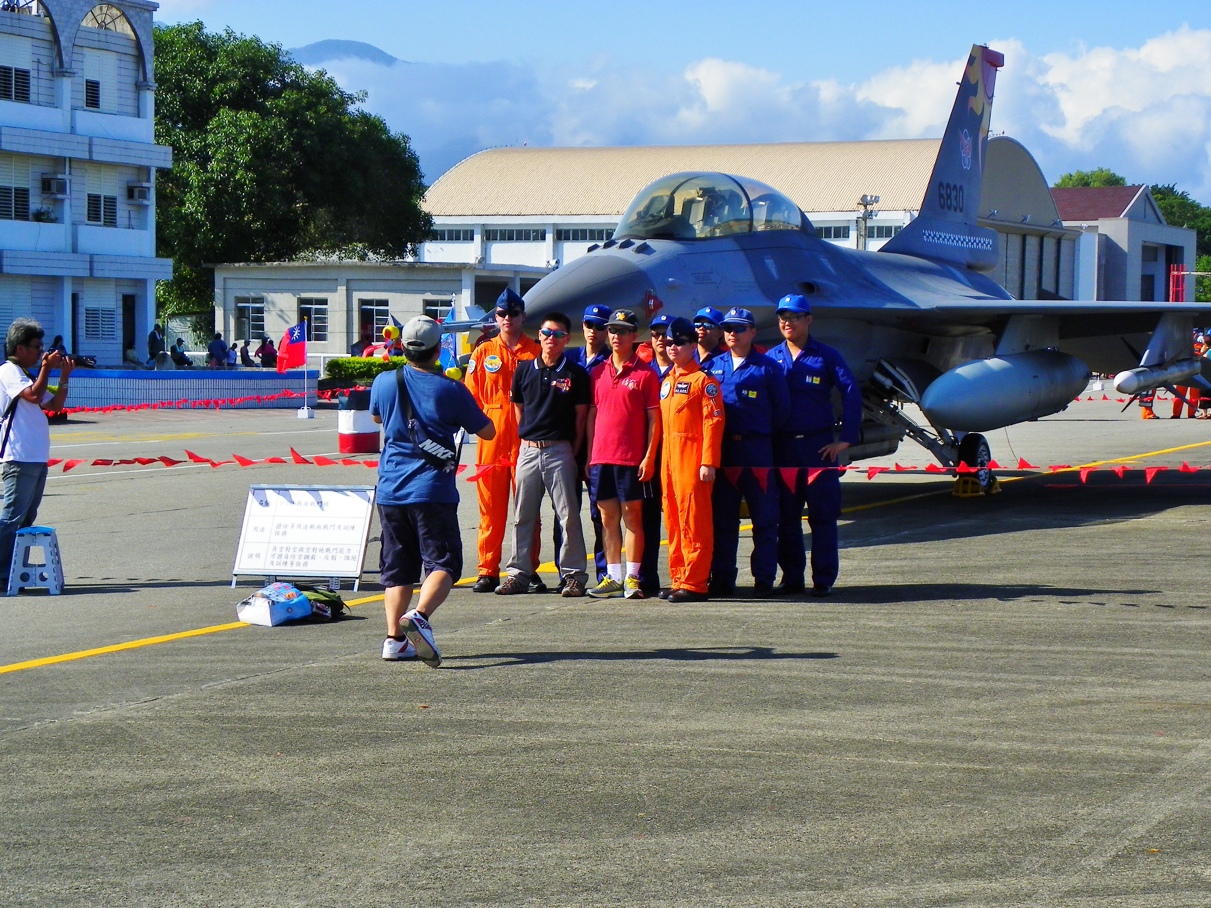 2013年空軍志航基地營區開放活動，遊客與基地飛行員、地勤人員在F-16B 6830前合影留念。